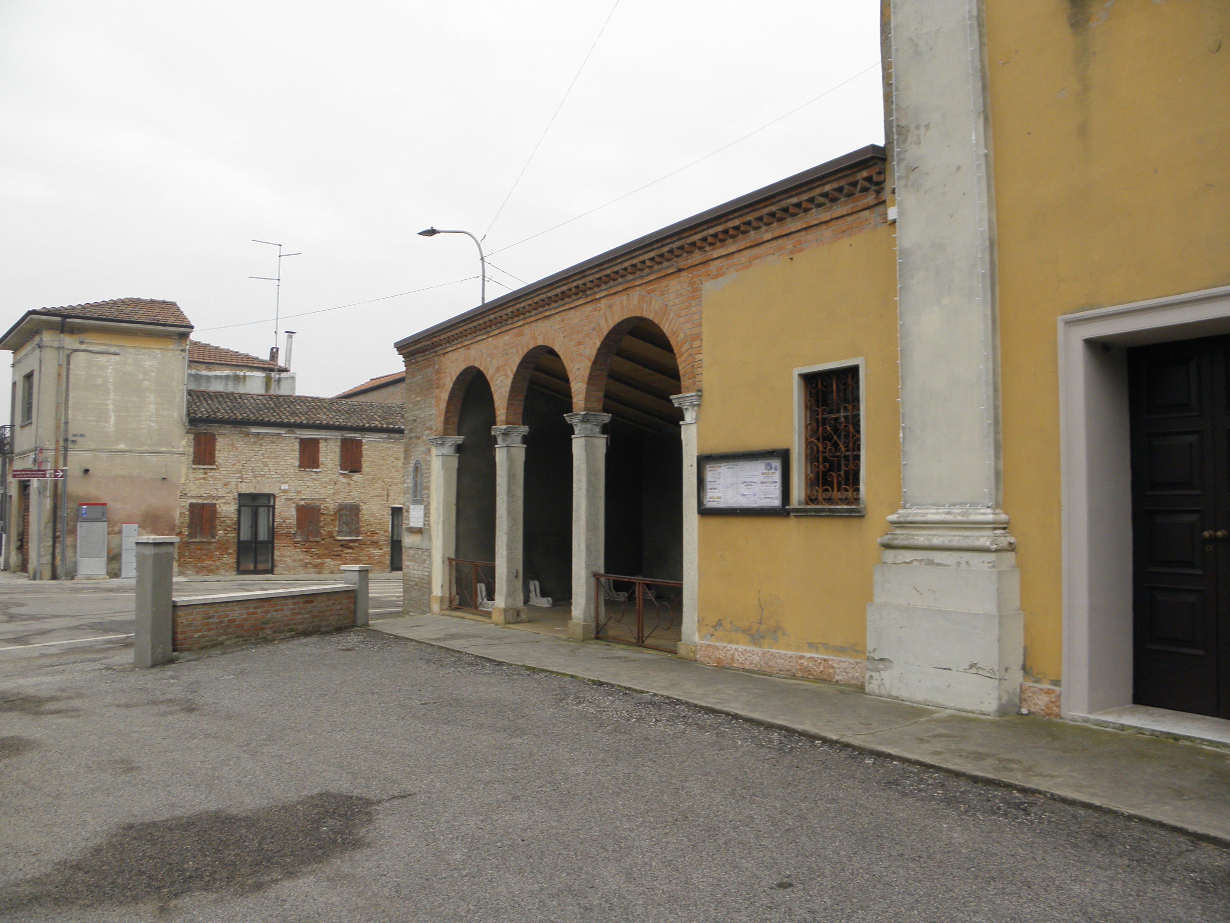 Coccanile, frazione di Copparo: la chiesa parrocchiale di San Venazio in Coccanile.